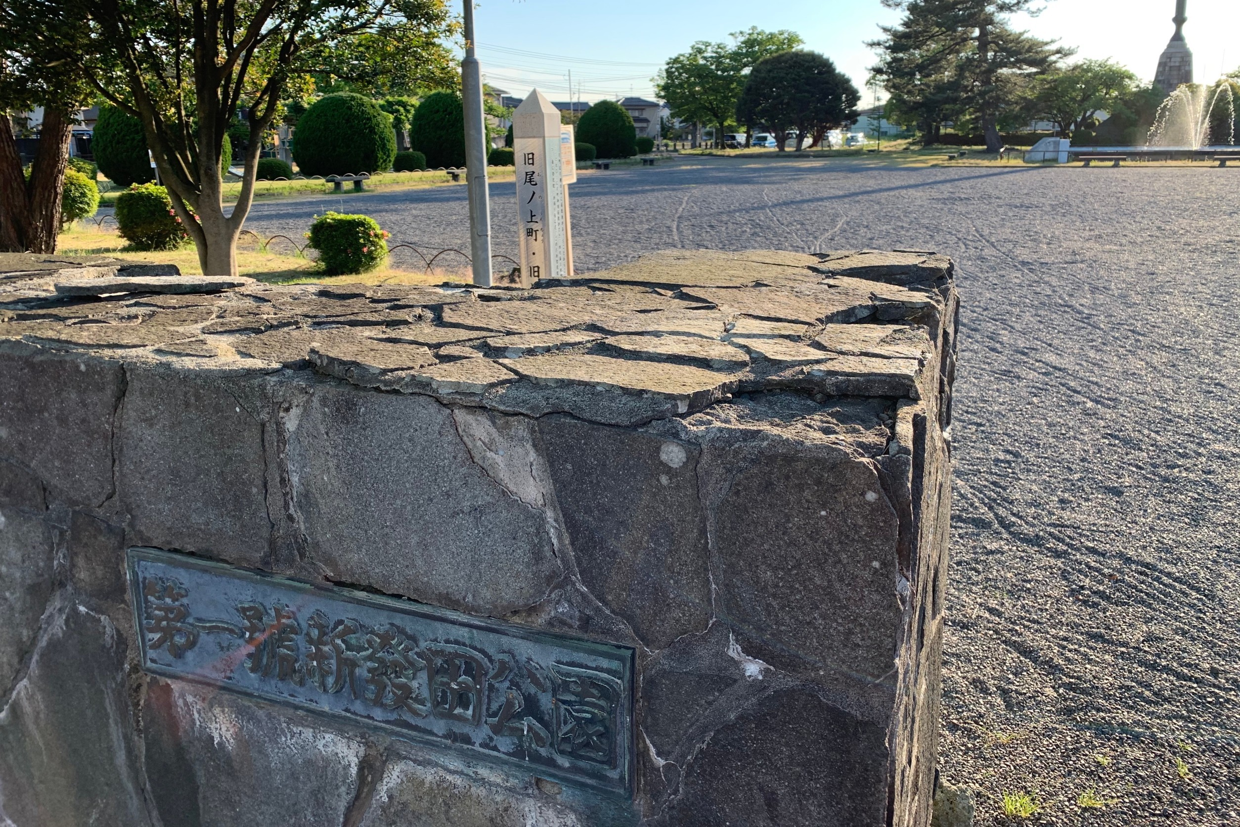 「第一號新發田公園」と書かれた新発田西公園の表示板（2020年5月）